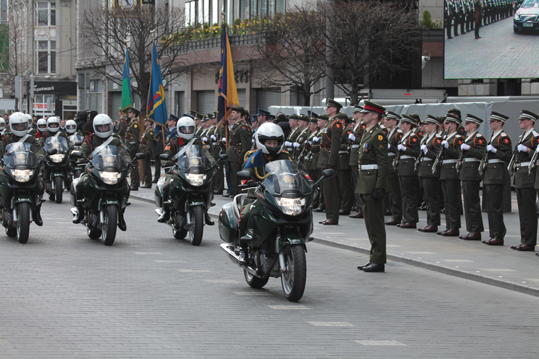 2nd Cav Presidential Escort